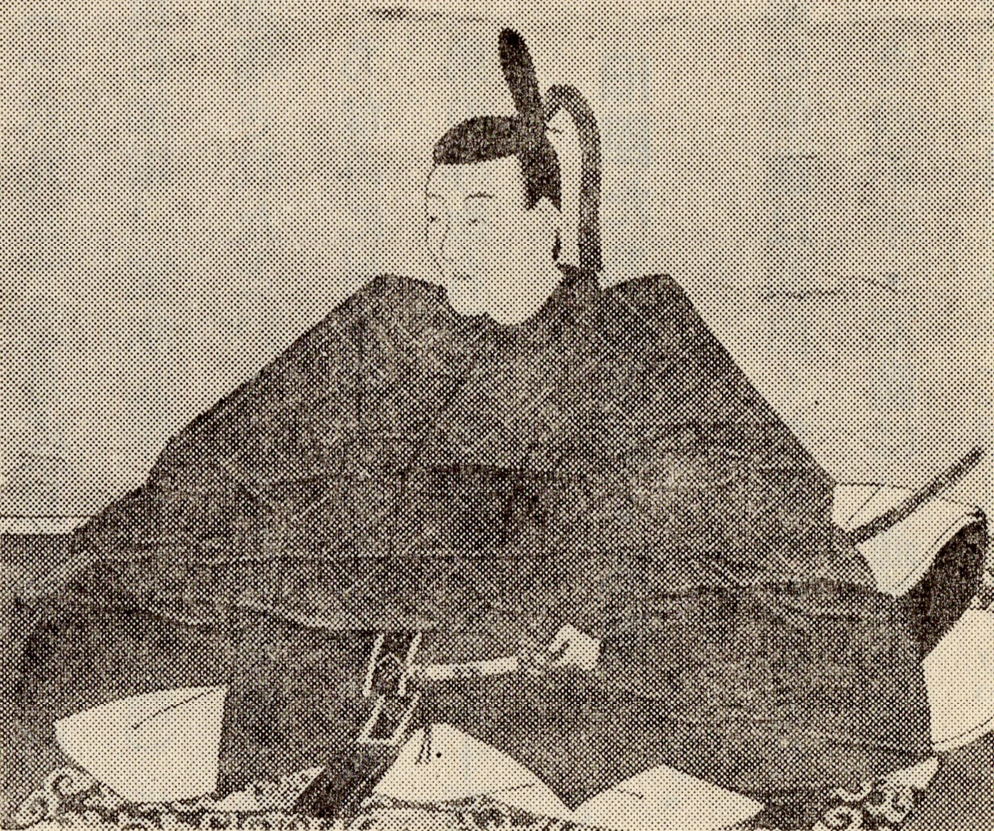 久留島通政の肖像(モノクロ)。